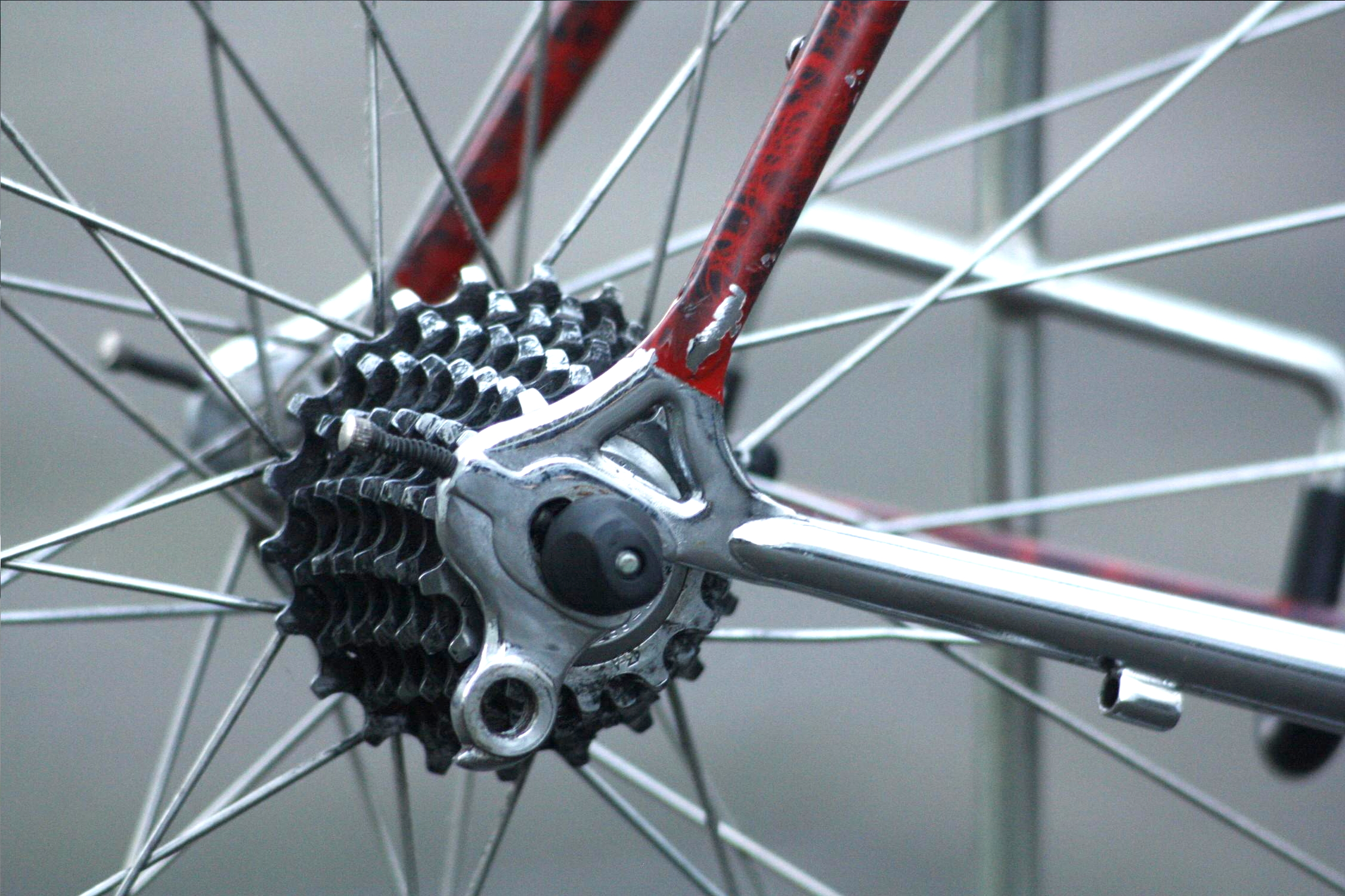 Trop-outs of a 90th roadbike by Columbus